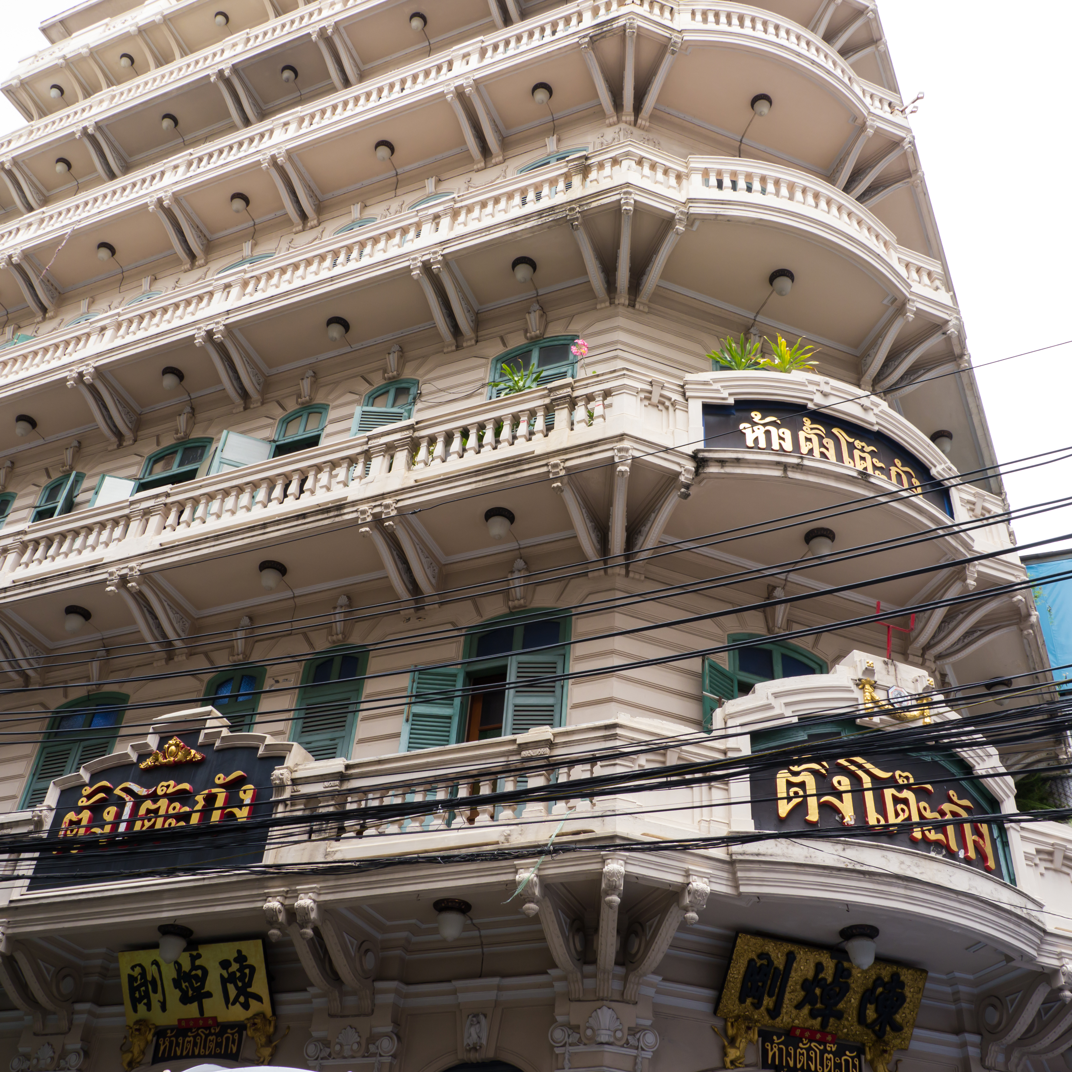 ห้างทองตั้งโต๊ะกัง